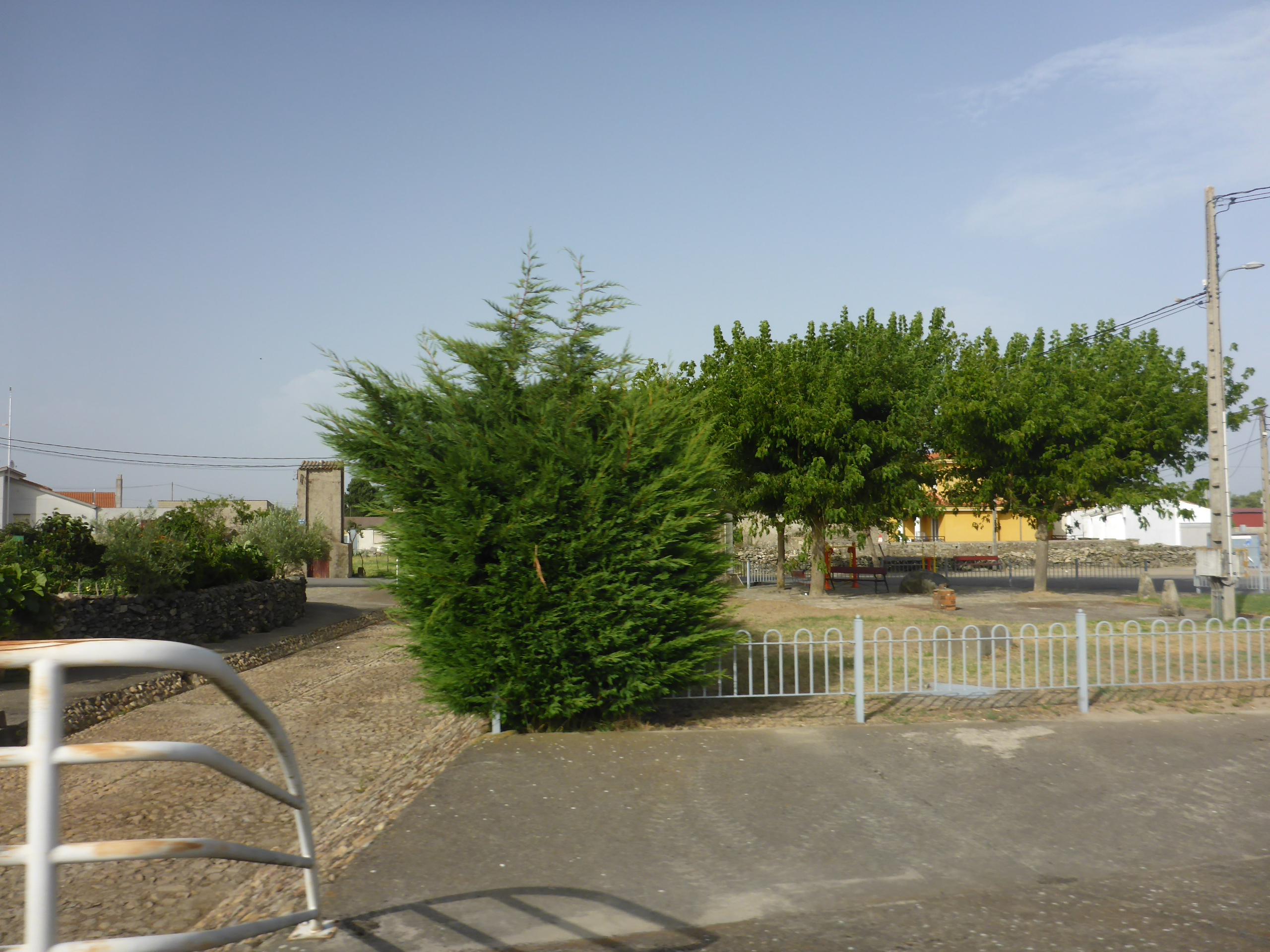 Valderrodrigo